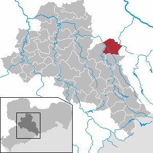 Reinsberg in Saxony - district Mittelsachsen